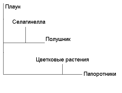 Кладограма классического древовидного вида, показывает взаимоотношения между различными группами растений